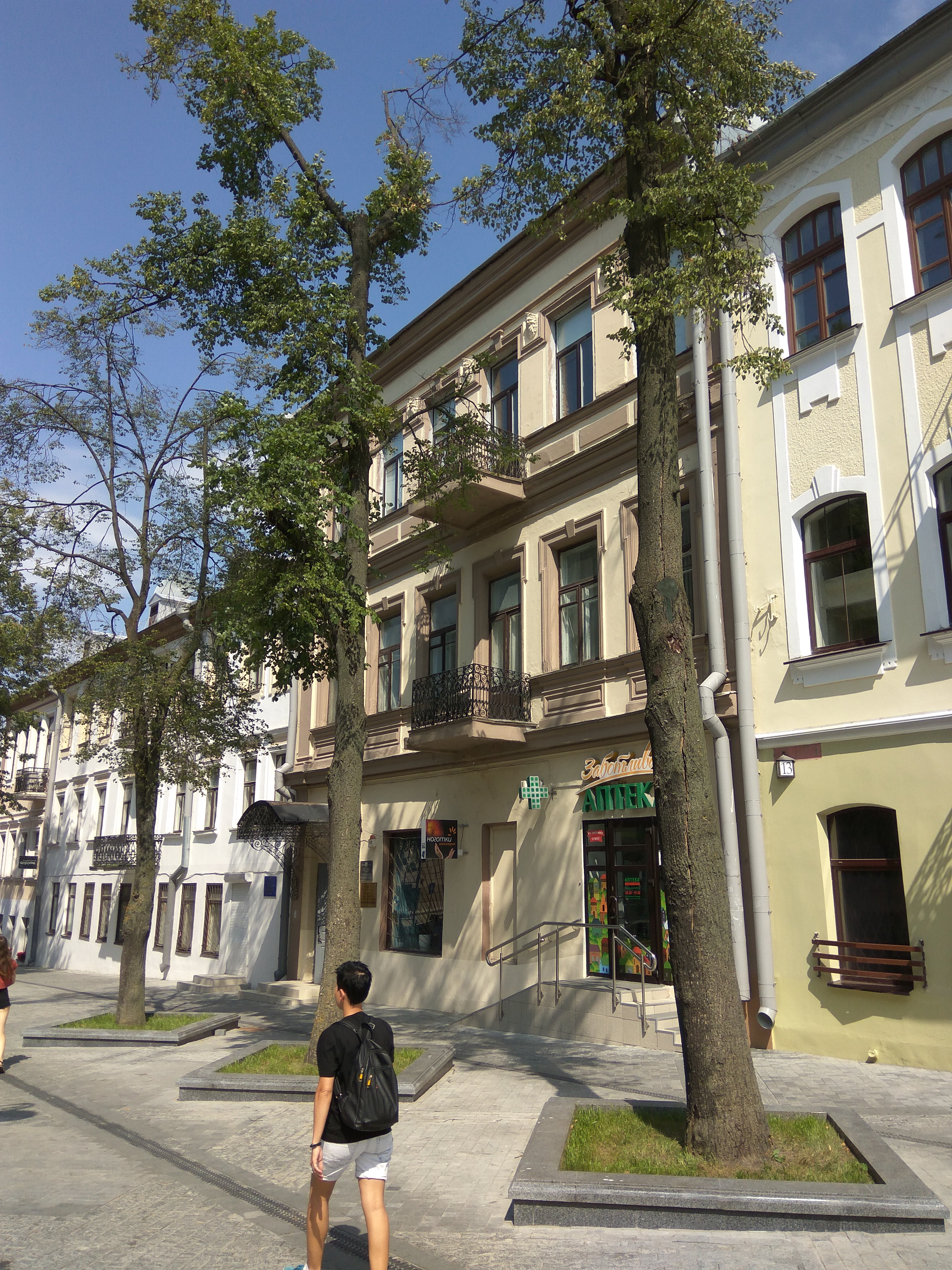 Мінск. Пешаходная Камсамольская (жнівень 2018)